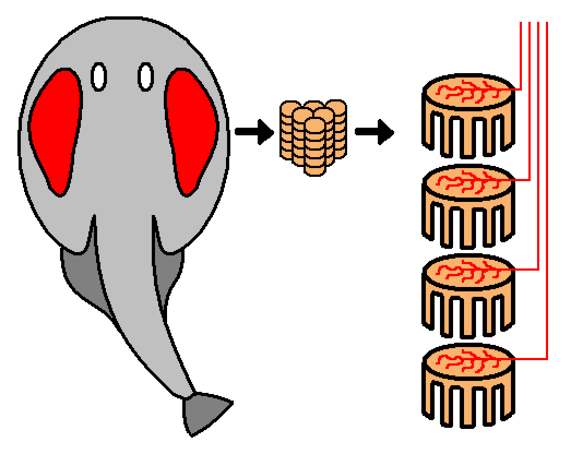 Position und Aufbau des Elektroplax am Beispiel eines Rochens